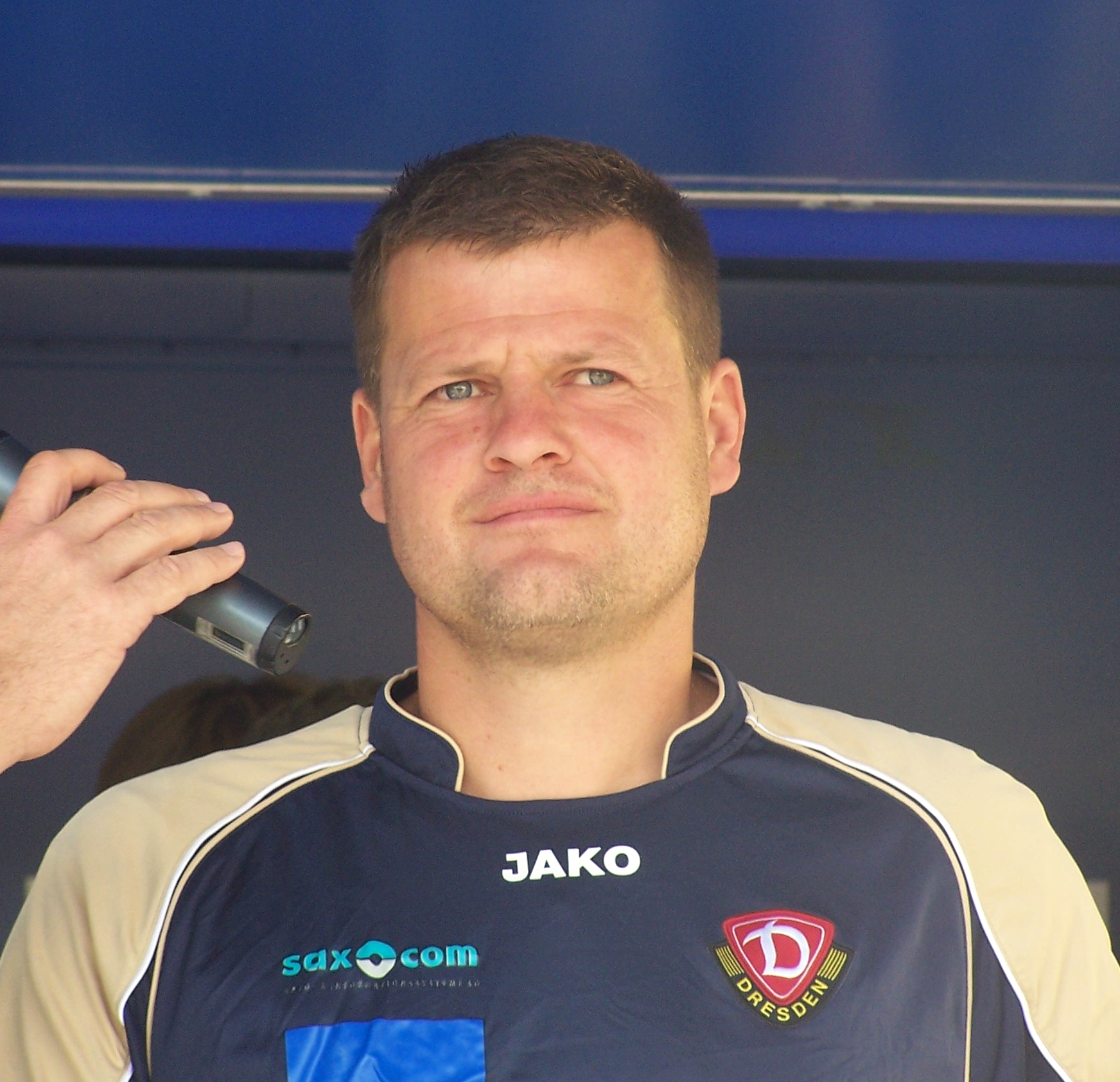 Matthias Maucksch, Trainer der zweiten Mannschaft, bei der Teampräsentation von Dynamo Dresden zum Start der Drittliga-Saison 2008/09